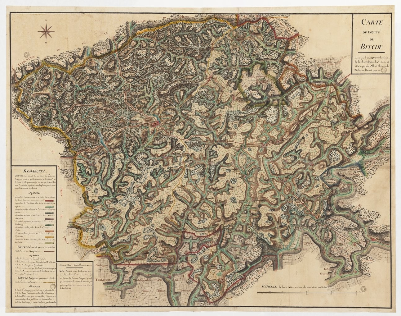 Carte du Comté de Bitche. Levée par le Sr Jaquet, chevalier de l'ordre militaire de St. Louis et aide major des ville et chateau de Bitche en l'année 1749.